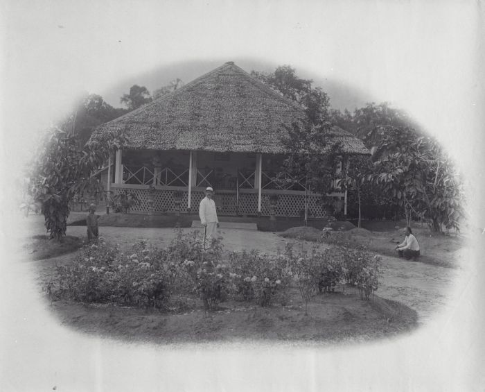 Foto. Mijn voorlopig huis te Soengei Biroeng-estate